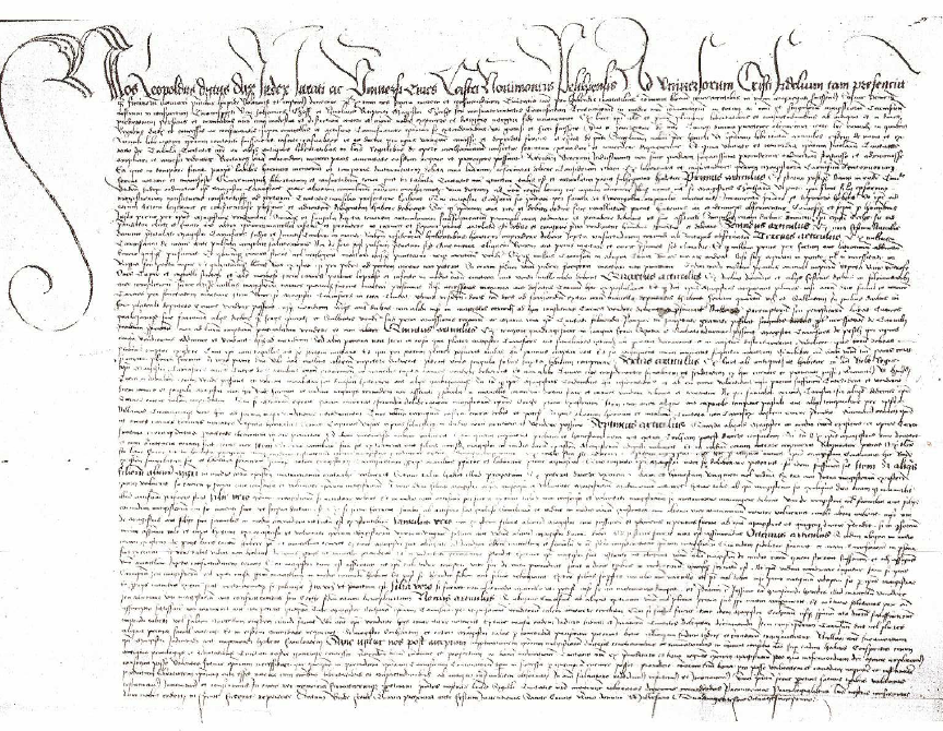 Budai húsmívesek céhlevele, 1481. május 2. A budai Húsmíves Céh működésének szabályzatát 9 pontba (artikulus) szedték. Az 1. artikulusban a céhmester választás és az eskütétel szerepelt. A 2. artikulus előírta, hogy karácsonykor meg kell ajándékozni a városi elöljárókat. A 3. artikulus szólt arról, hogy marhát vágni csak a vágóhídon a víz felett, napvilágnál szabad. Csak olyan, teljesen egészséges állatot lehetett levágni, amelyiket a saját lábán hajtottak fel a vágóhídra és fertőző betegségben sem szenvedett. Lopott jószág vásárlását tiltották. A 4. artikulus a vasárnapi és ünnepnapi húsárusítást tiltotta meg. Szabályozta, hogy a mészárszéken kívül, a piacon csak heti 2 napon lehetett húst árulni. Az 5. artikulus korlátozta a felvásárolható marha mennyiségét. A 6. artikulus a lenyúzott bőrök árusításáról szólt. A 7. artikulus szabályozta a házasodást. Itt írták le a legényből mesterré válás feltételeit. A 8. artikulus az örökösödést és az özvegyekről való gondoskodást rögzítette. A 9. artikulus a kölcsöntartozás és pereskedés esetével foglalkozott.